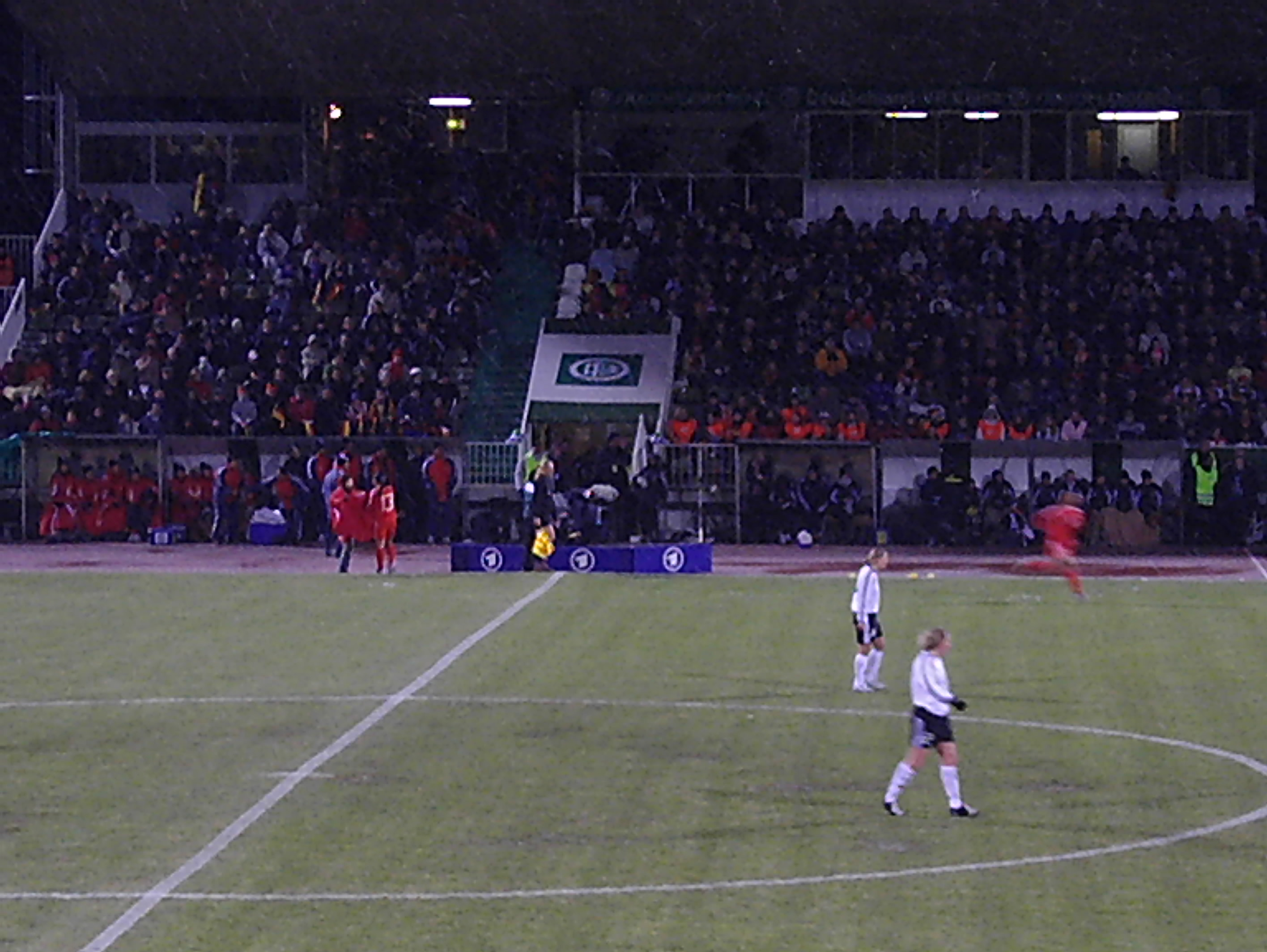 Die überdachte Tribüne des Waldstadions Homburg während des Frauennationalmannschaftsländerspiel Deutschland - VR China.